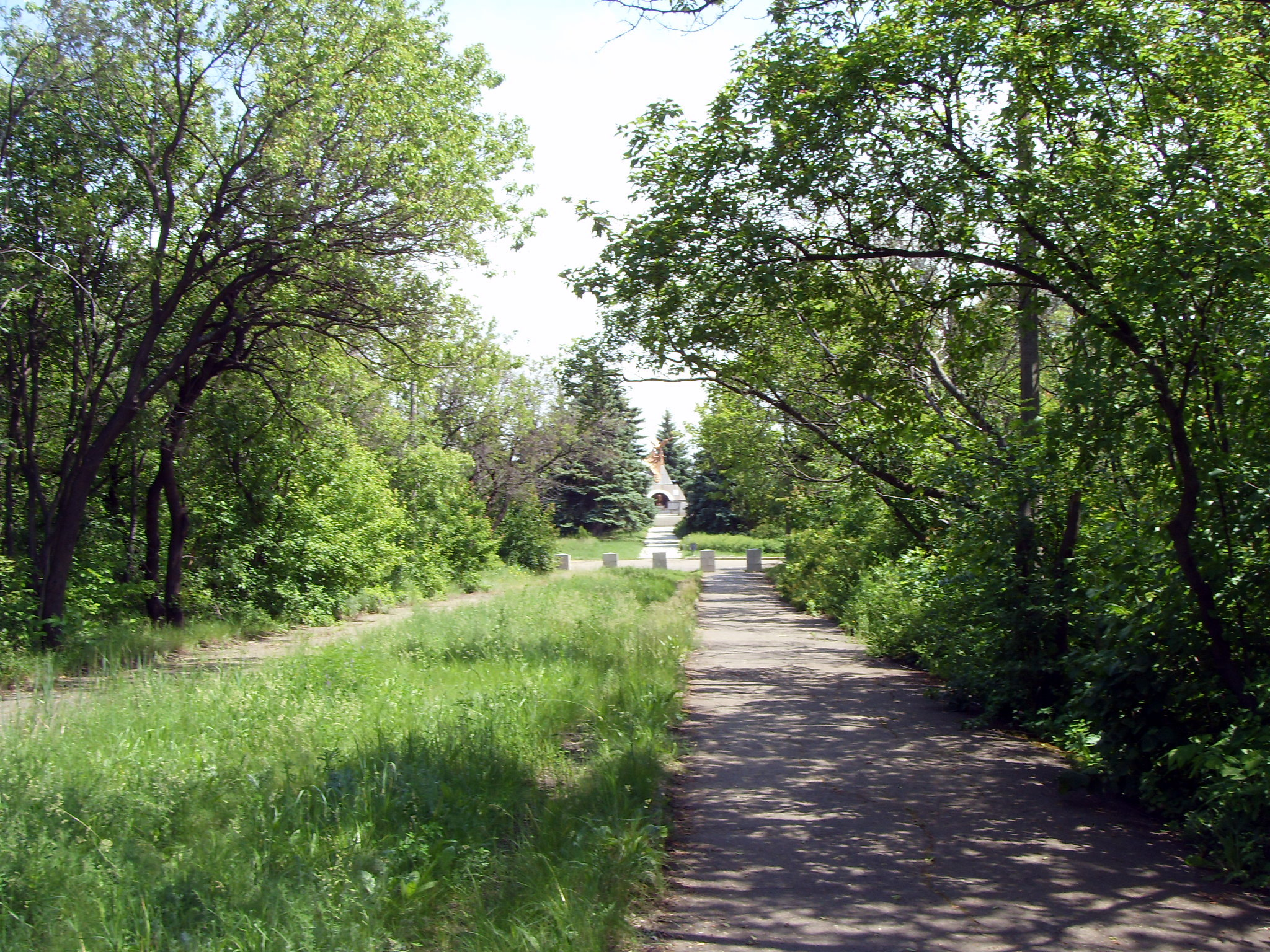 Гостра Могила, м. Луганськ Луганське лісництво кв. 33, 34